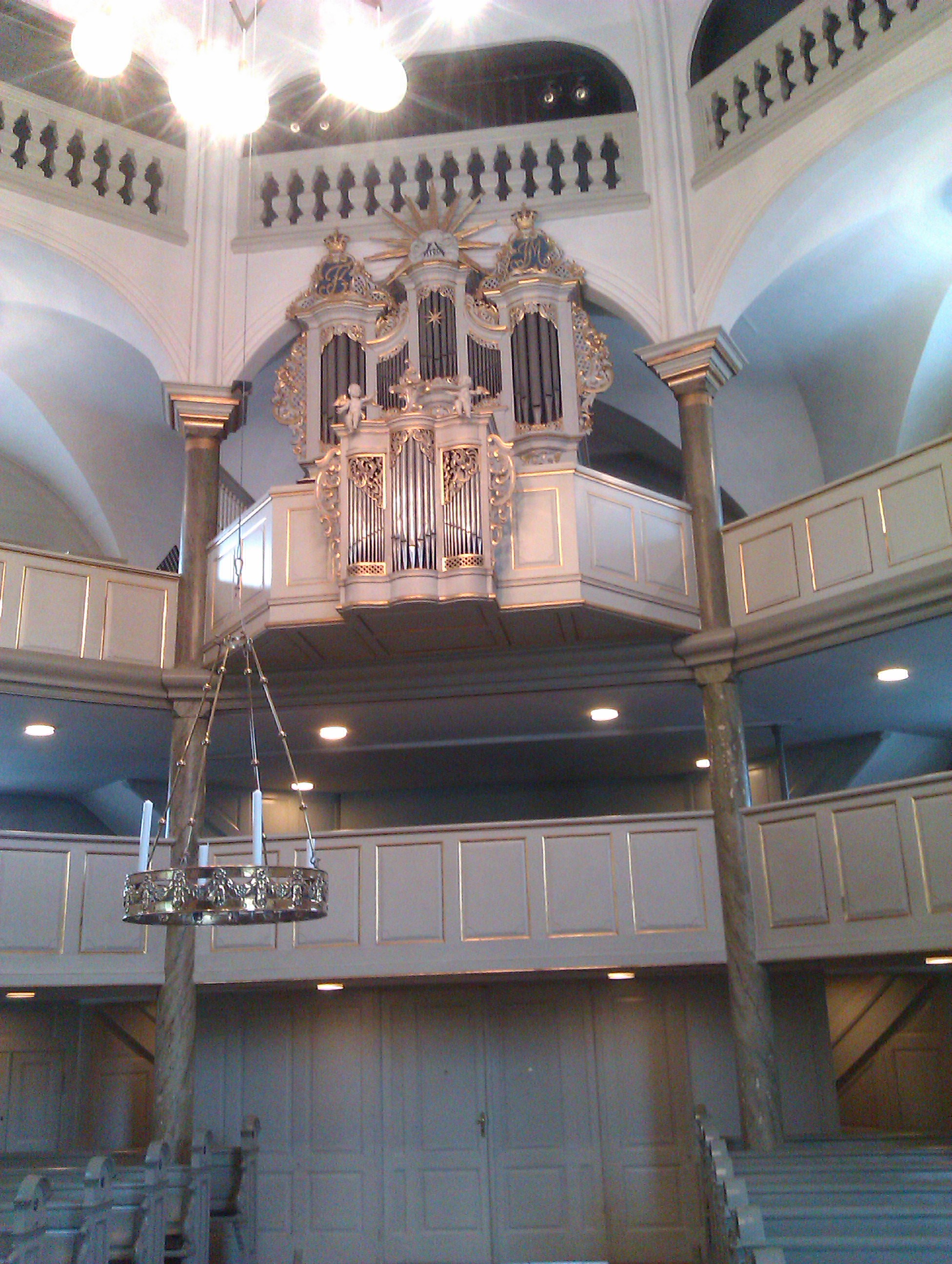 Orgel i Frederiksberg Kirke med Frederik V og Juliane Maries monogrammer, Frederiksberg, Sjælland